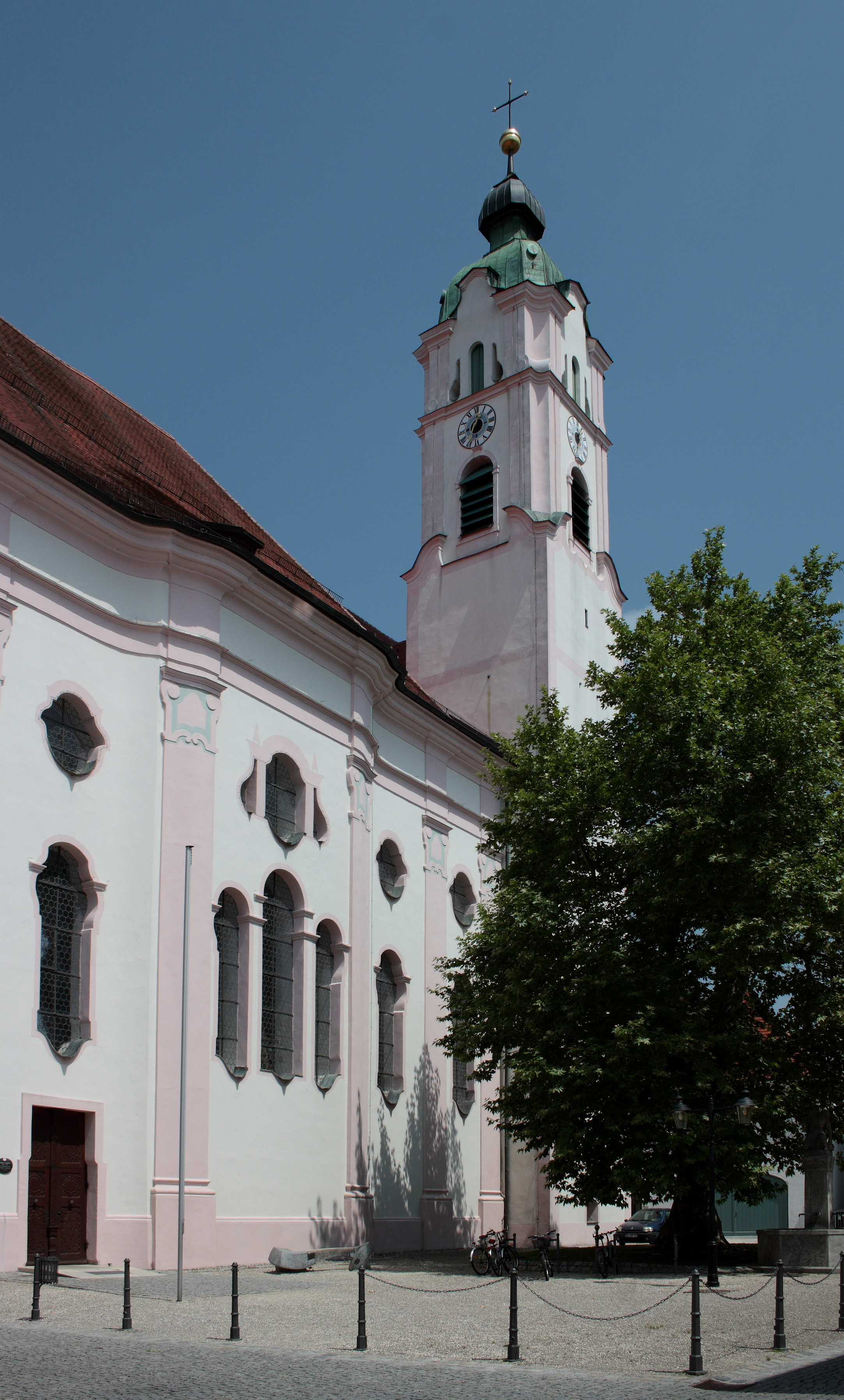 Katholische Kirche Zu Unserer Lieben Frau (Frauenkirche) in Günzburg (Bayern), 1736-1741 von Dominikus Zimmermann gebaut, Südfassade